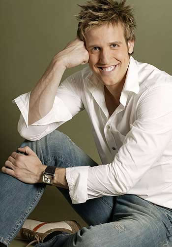 El presentador español Óscar Martínez